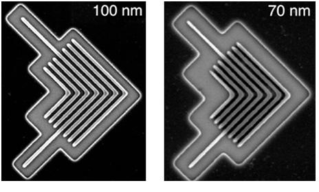 شکل 7- نمونه ای از تولید به روش EUVL